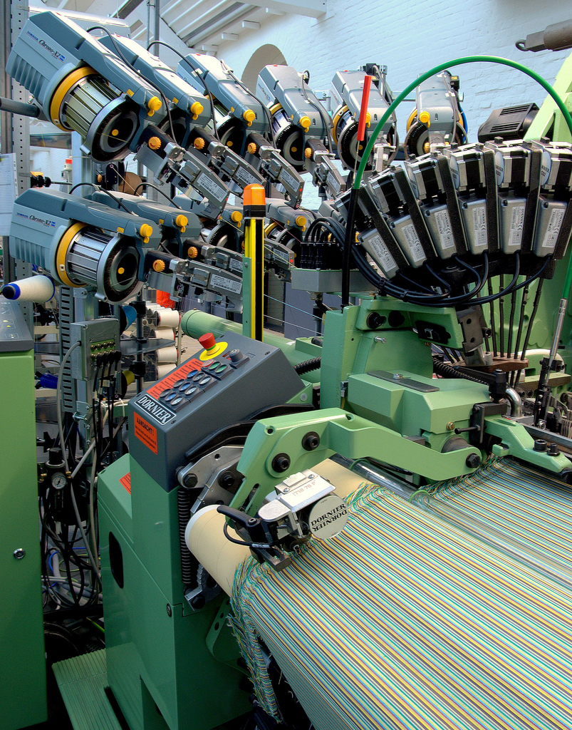 Easy Leno grijperweefmachine, Dornier (Lindau am Bodensee), ca 2007, (13028) Easy Leno grijperweefmachine, Dornier Lindau am Bodensee, ca 2007, (13028)